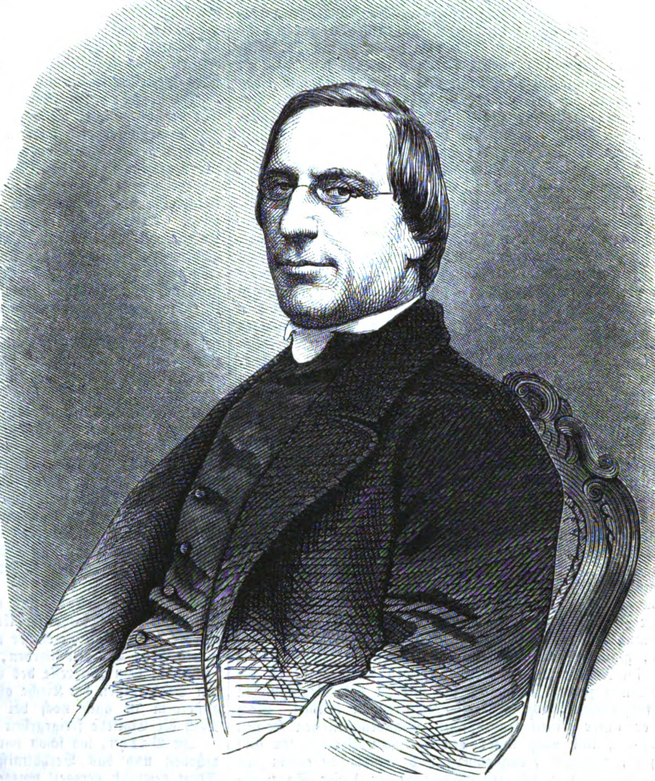 Carlo Passaglia, italienischer Theologe im 19. Jh.